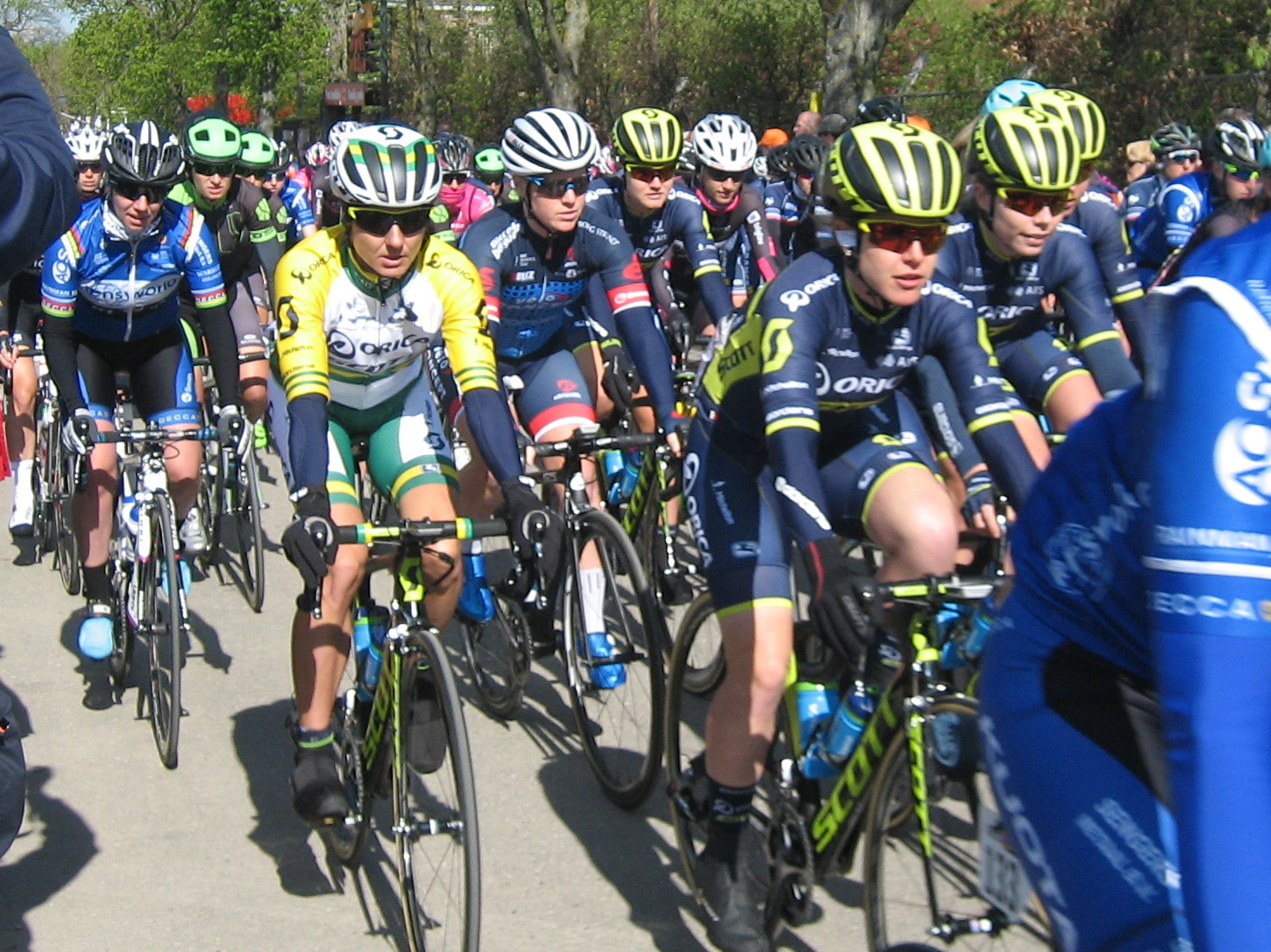 Start van de Waalse Pijl 2017